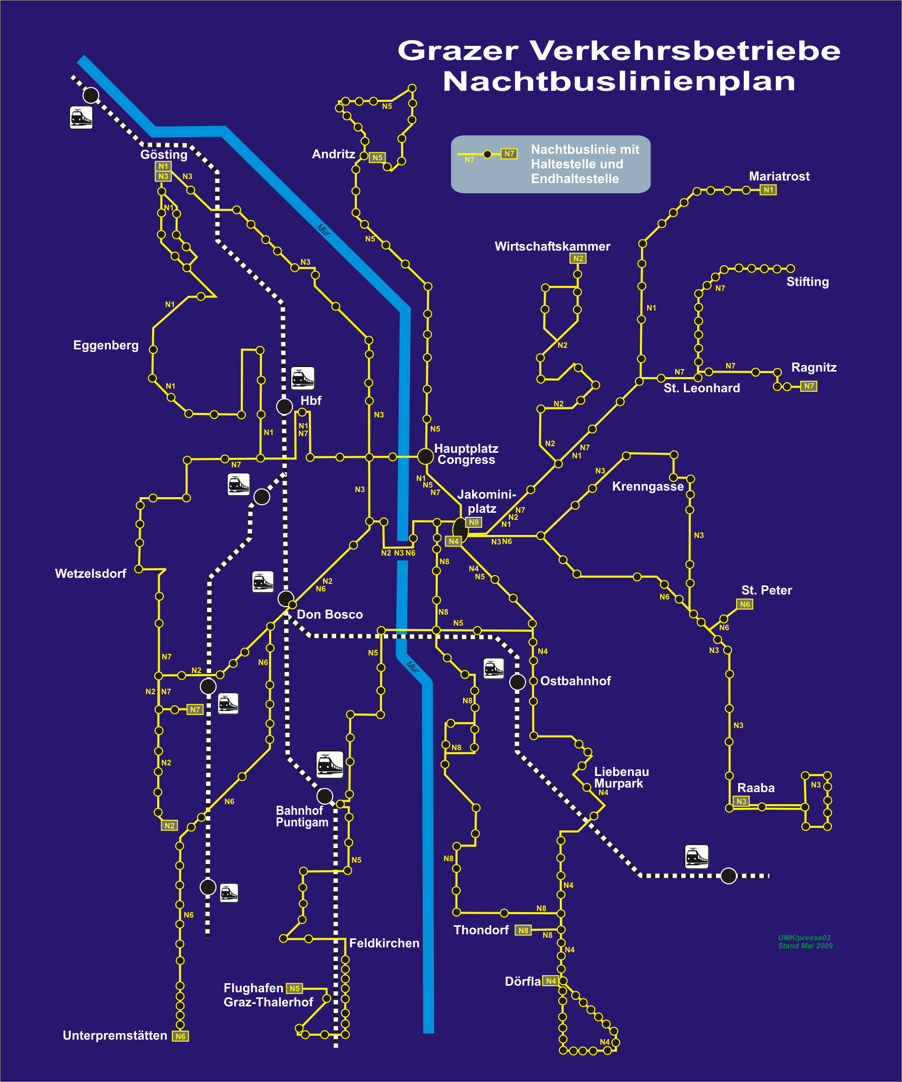 Grazer Verkehrsbetriebe GVB - Nachtbuslinienplan 2008